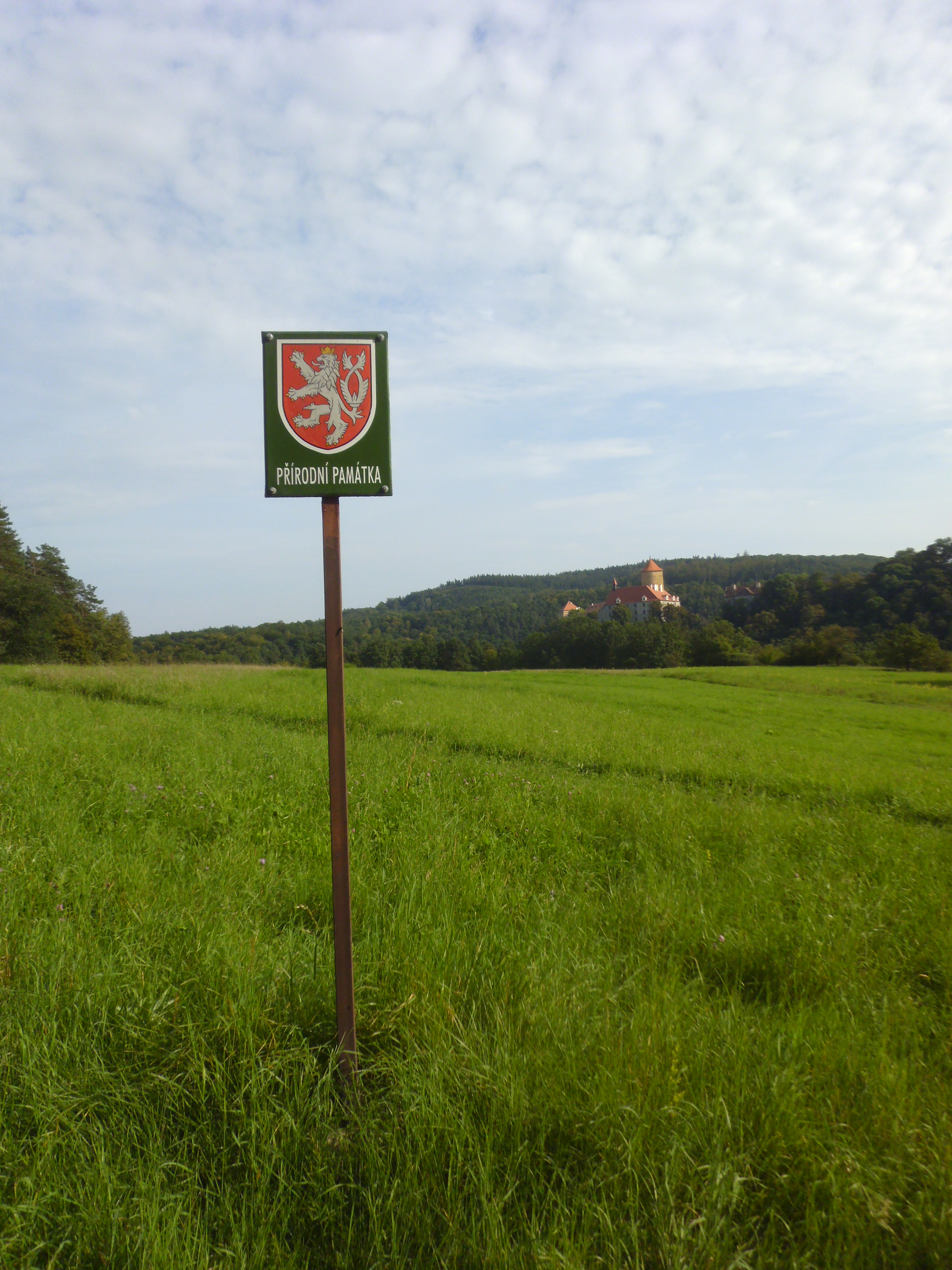 Přírodní památka Junácká louka v Brně. Cedule s hradem Veveří v pozadí.